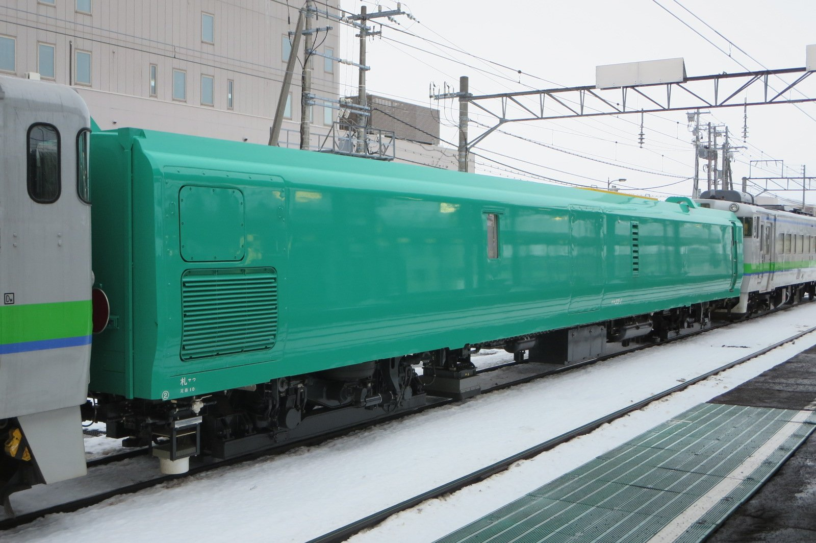 マヤ35形の試運転です(キハ40によるプッシュプル)